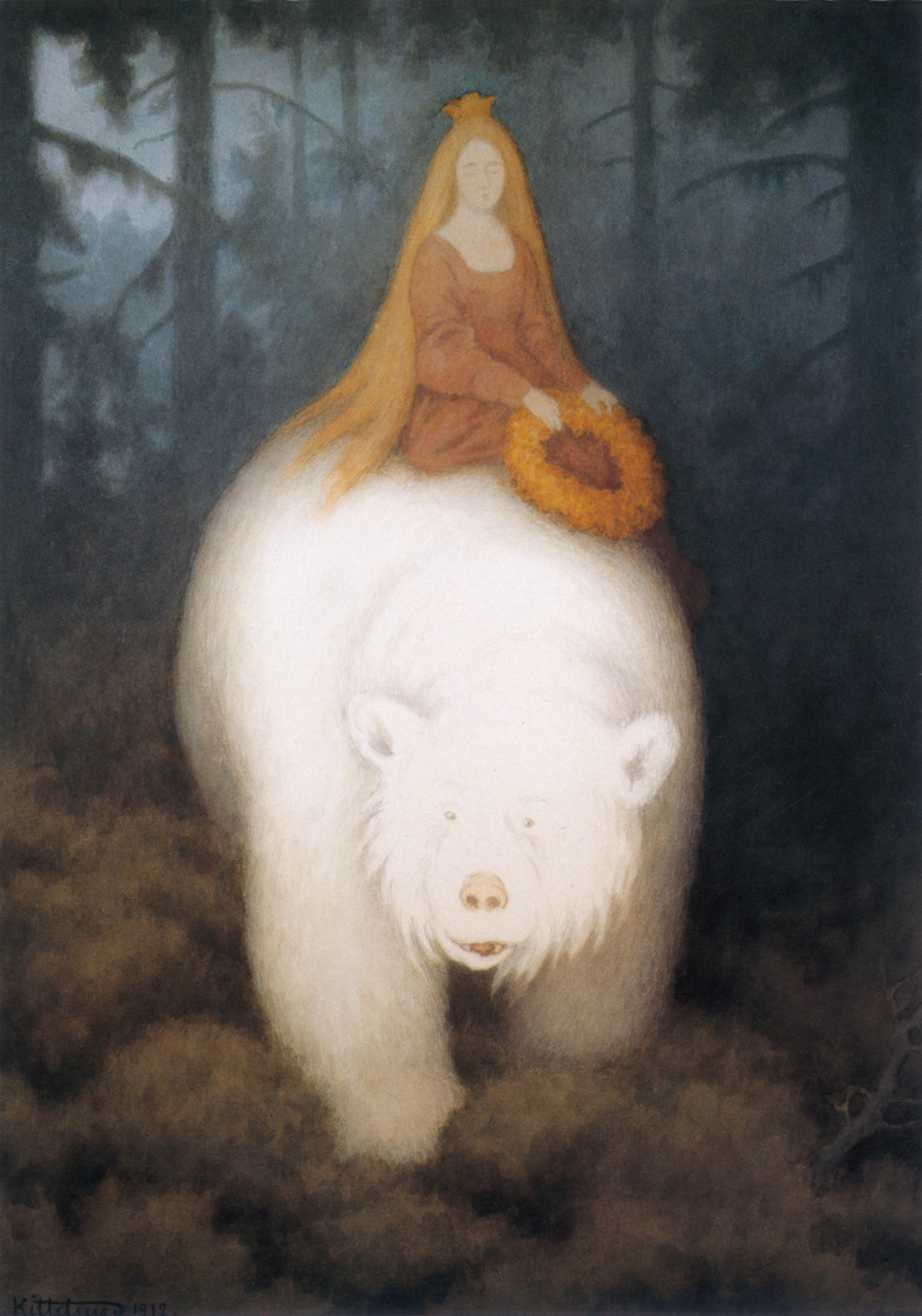 White Bear King Valemonlabel QS:Lru,"Белый медведь король Валемон» работы Теодора Киттельсена." label QS:Len,"White Bear King Valemon"